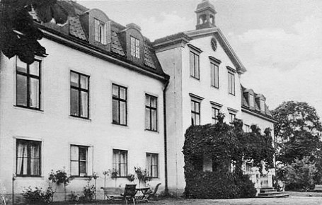 Malstanäs herrgård